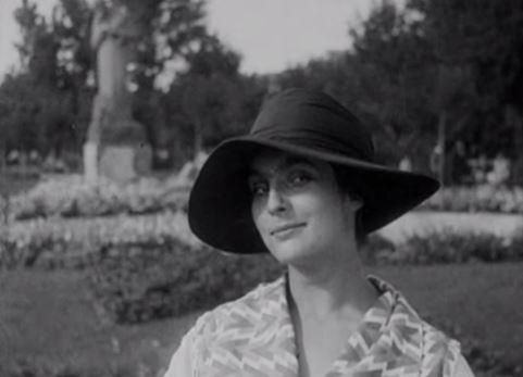 Julija Solnceva, screenshot del film Папиросница от Моссельпрома (La sigaraia del Mossel'prom), di Jurij Andreevič Željabužskij, 1924